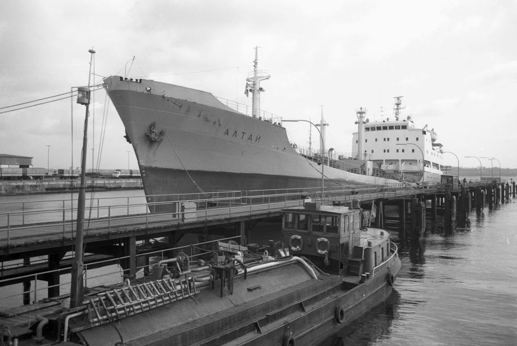 liefert im Scheerhafen Öl an. Im Vordergrund rechts die Tankschute FOLINE II.